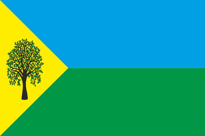 Прапор села Нагірне (Ренійський район)